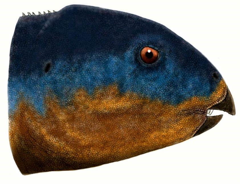 Recreación de Hualianceratops wucaiwanensis